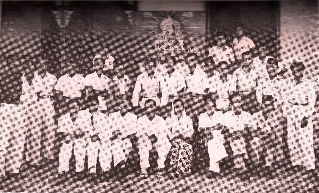 Konferensi INI di Samarinda, 7-8 Desember 1949.